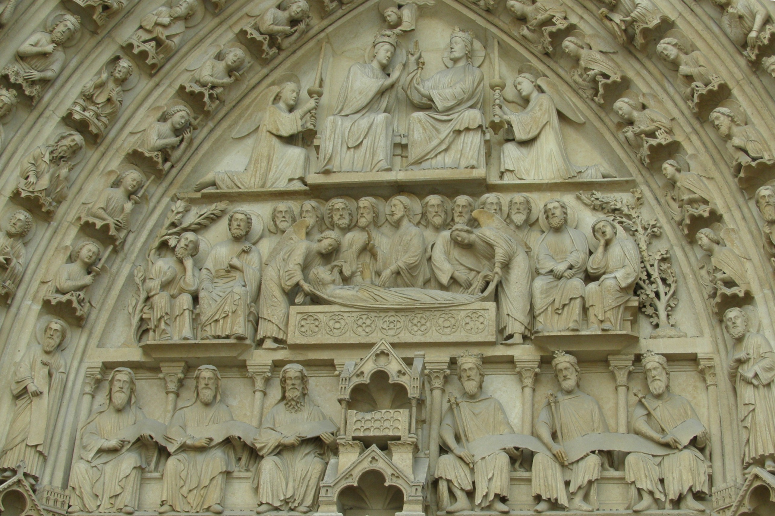 Cathédrale Notre-Dame de Paris